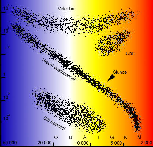 vlastní obrázek